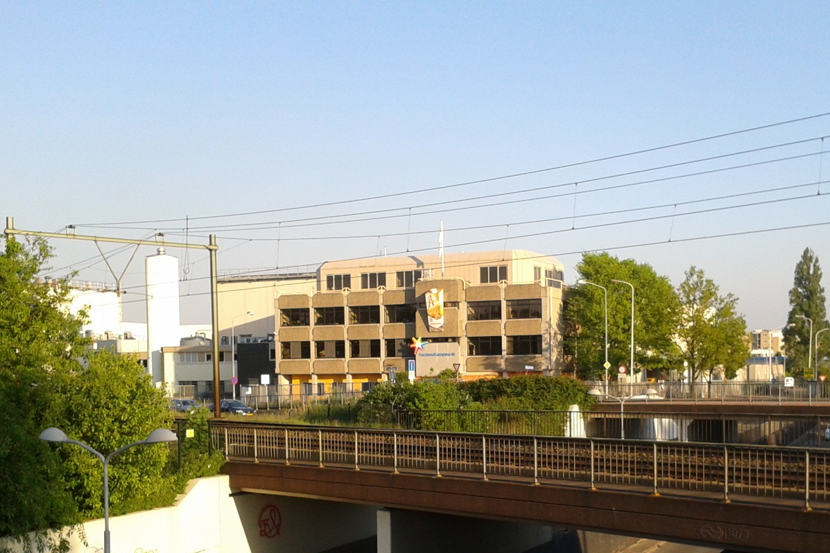 Friesland Campina Ede. Riedel.